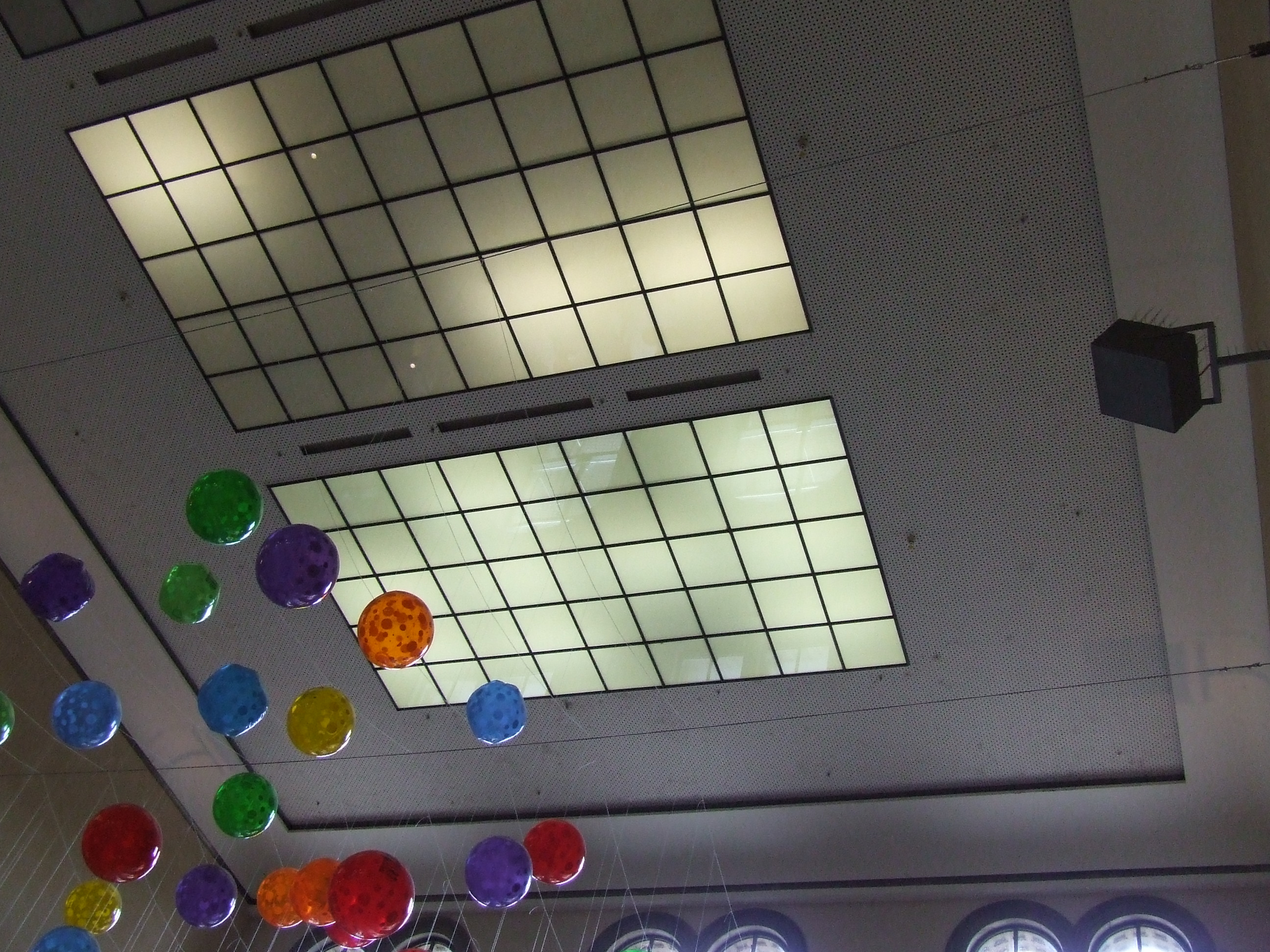 Mainz Hauptbahnhof in Mainz. Central Station, Mainz, Germany